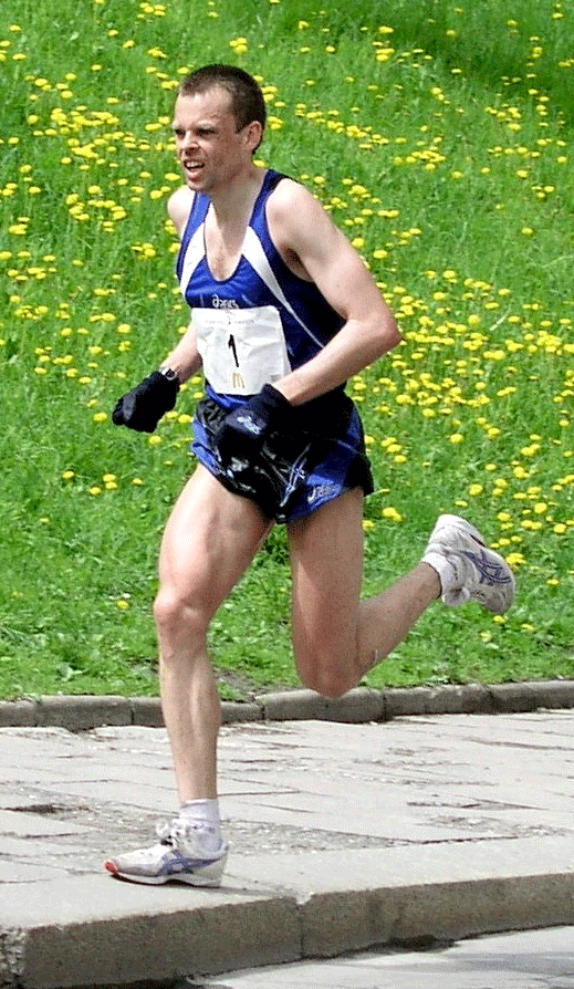 Piotr Gladki au matin du 7 mai 2005 lors du marathon de Cracovie Grafika:Piotr Gładki 4CM 280 (autor A Benecka).jpg Bild:Gladki.gif